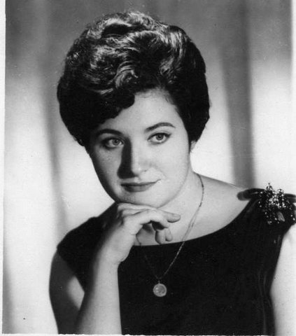 שרה שטרסברג-דיין